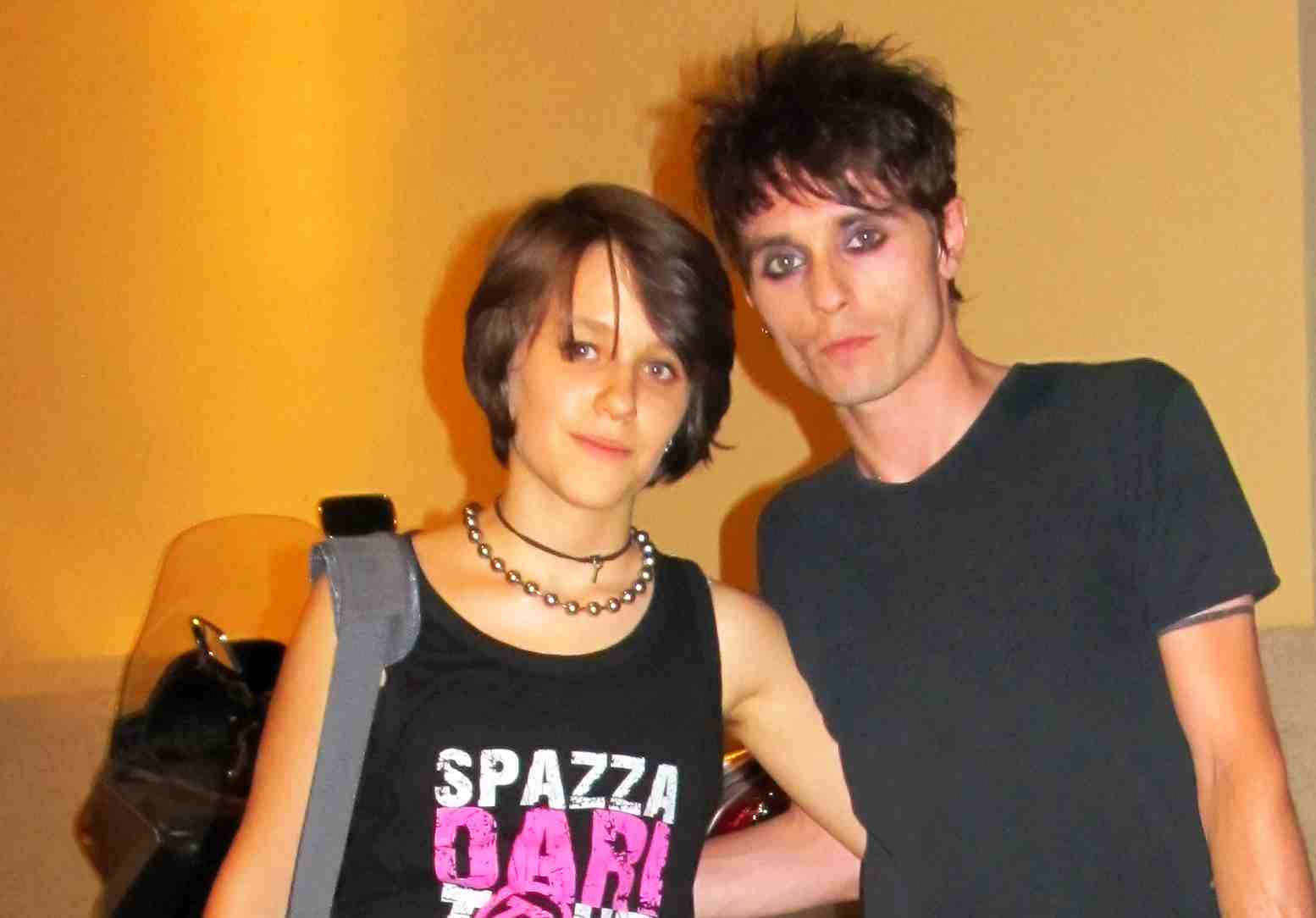 Concerto Artisti valdostani per l'Emilia (Cittadella di Aosta, 8 luglio 2012): Fabio "Fab" Cuffari con una fan